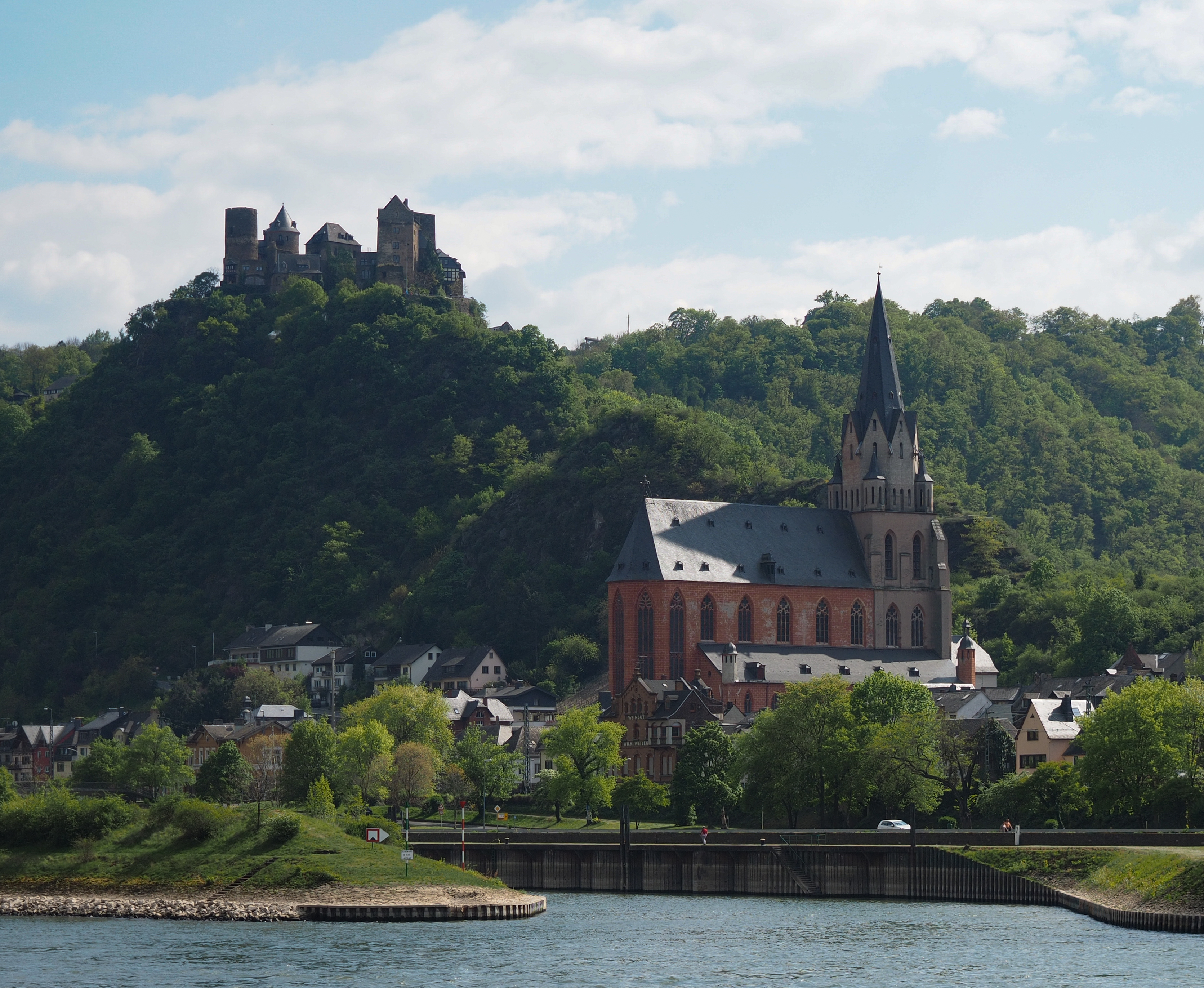 Liebfrauenkirche und Schönburg in Oberwesel